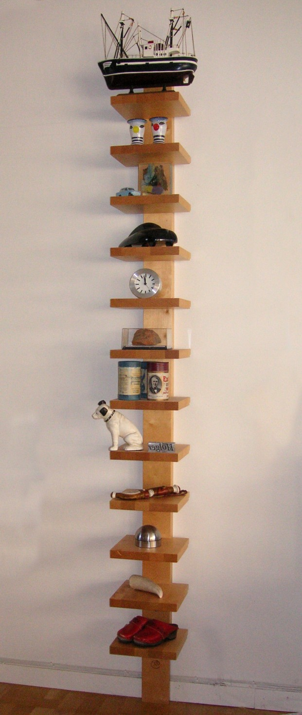 Kandell-hyllan